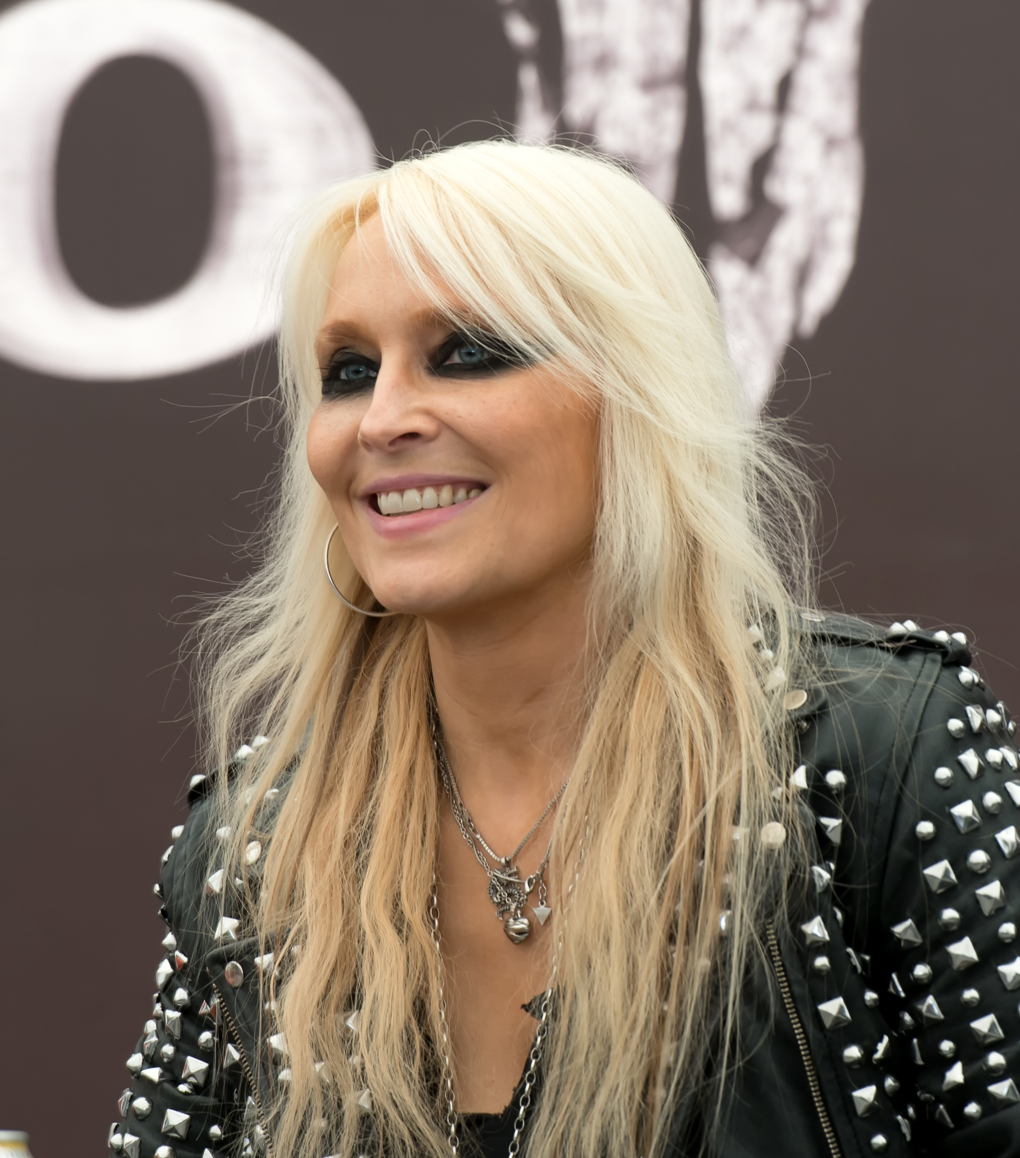 Doro beim Wacken Open Air 2017